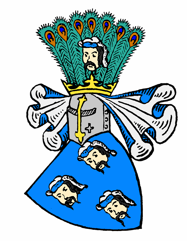 Wappen der von Below aus Pommern